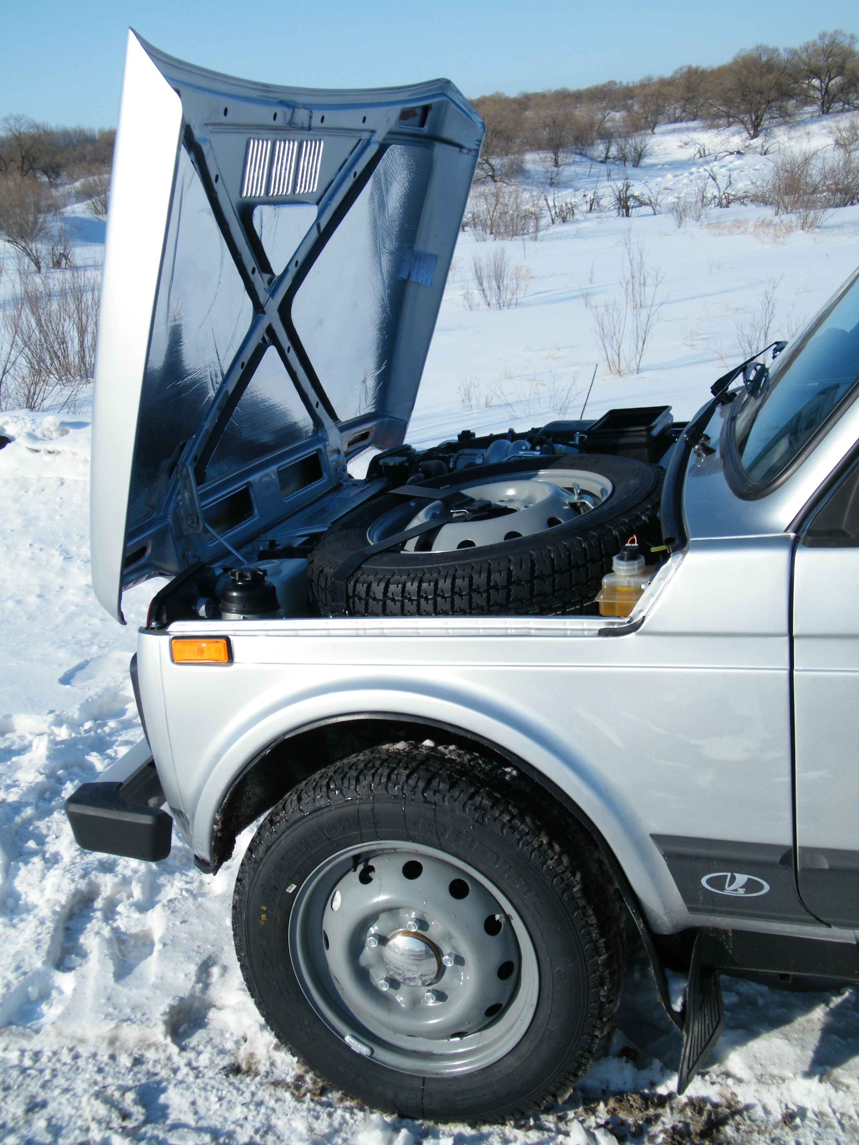 Lada Niva 2131